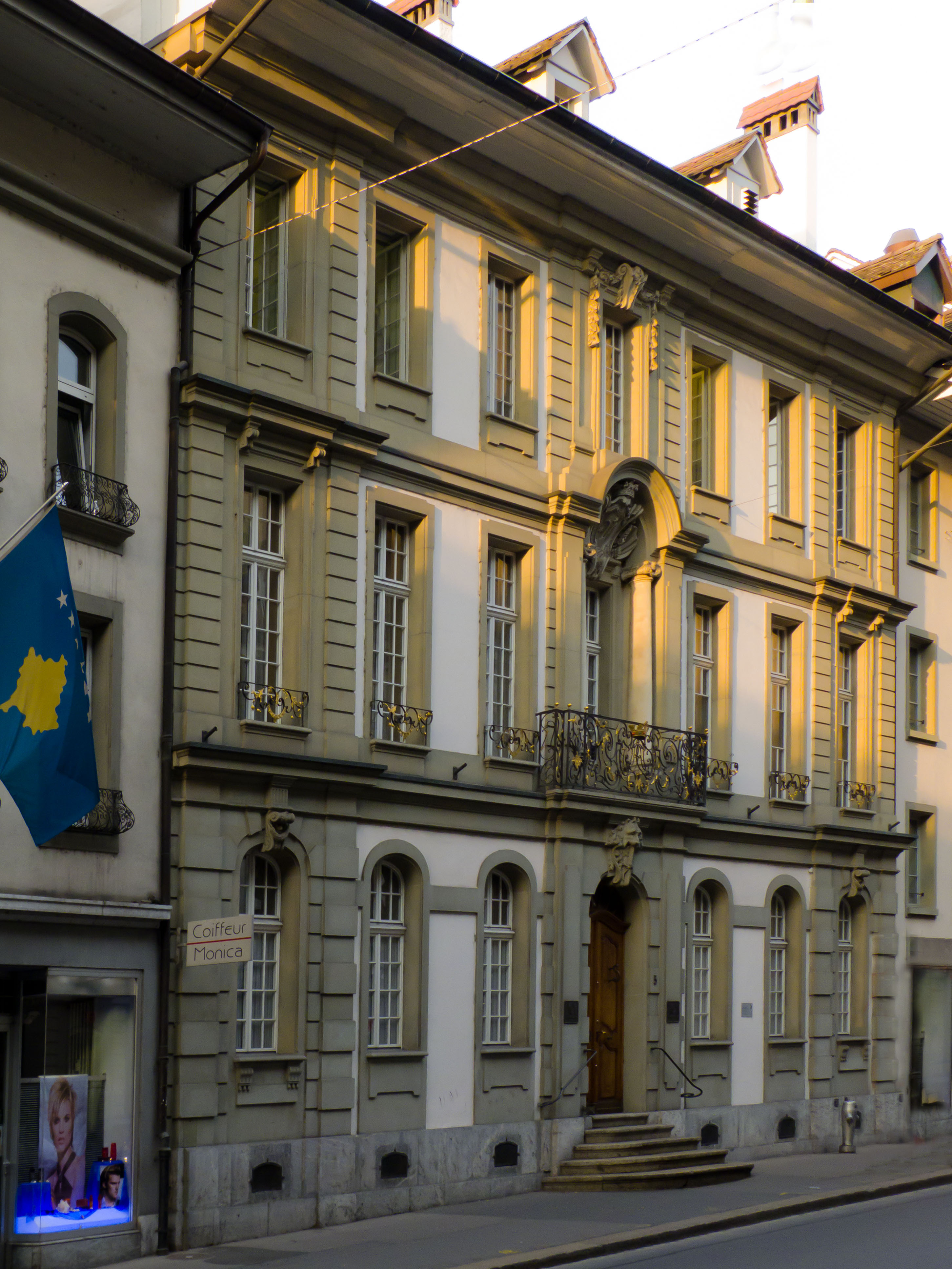 Burgerhaus Amthausgassseite, 18.Jhdt. für Johann Rudolf Fischer,Herr zu Bremgarten erbaut mit Gartenanlage auf Kochergassseite.